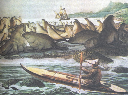 На акварели запечатлен алеут на лодке возле острова Святого Павла в Беринговом море. На заднем плане бриг «Рюрик».